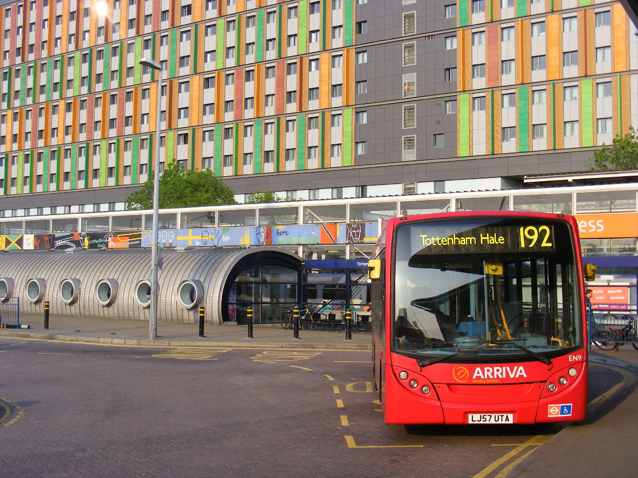 192 Bus, Hale Village, Tottenham Hale Station.